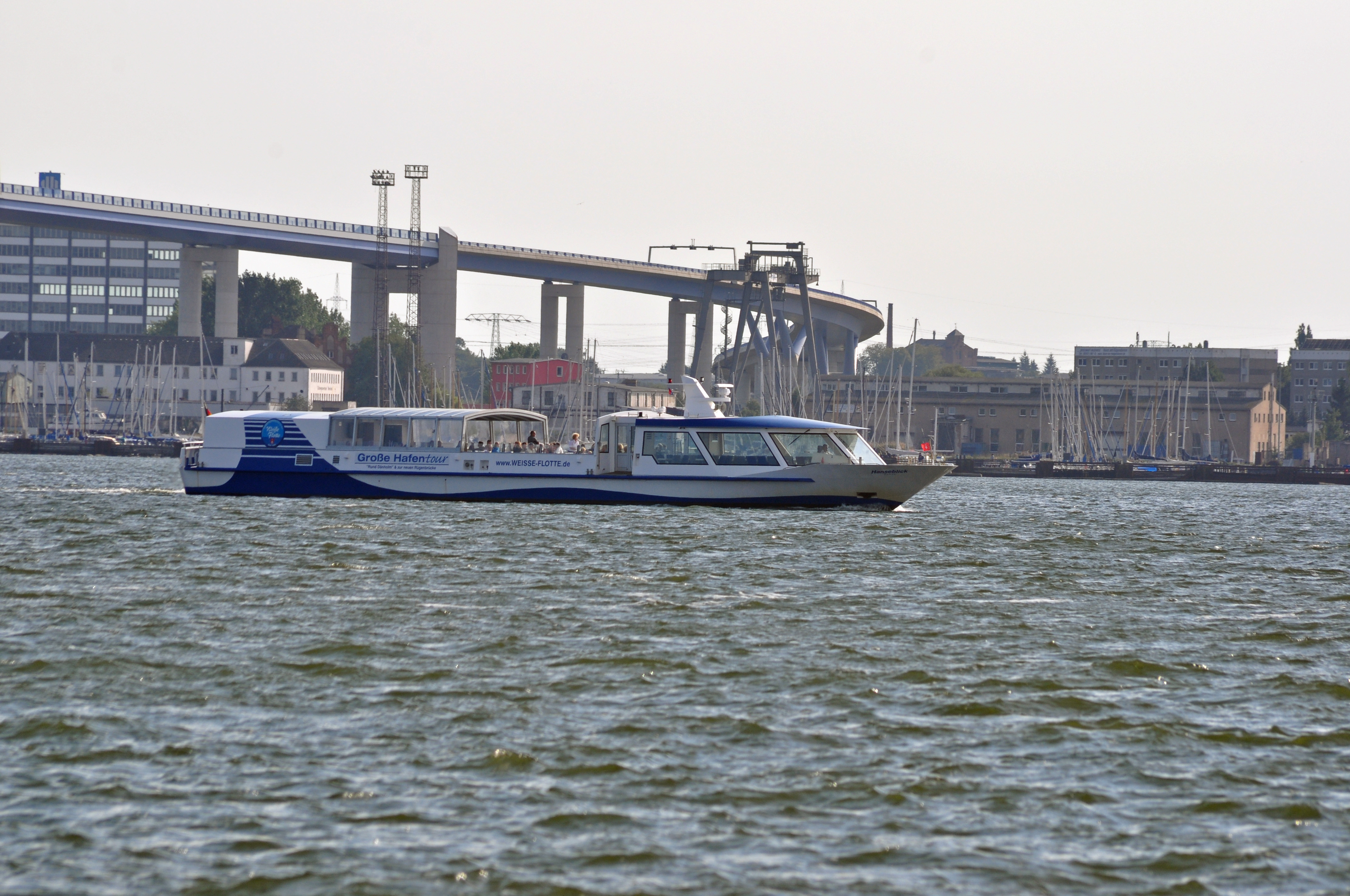 Das Fahrgastschiff Hanseblick Weiße Flotte Stralsund, Baujahr 2009, Schiffswerft Bolle GmbH Neuderben, Länge: 37,50 m, Breite: 6,50 m, Tiefgang: 1,20 m, Leistung: 2 x 189 Kw, Geschwindigkeit: 12 kn: Paxe: 160